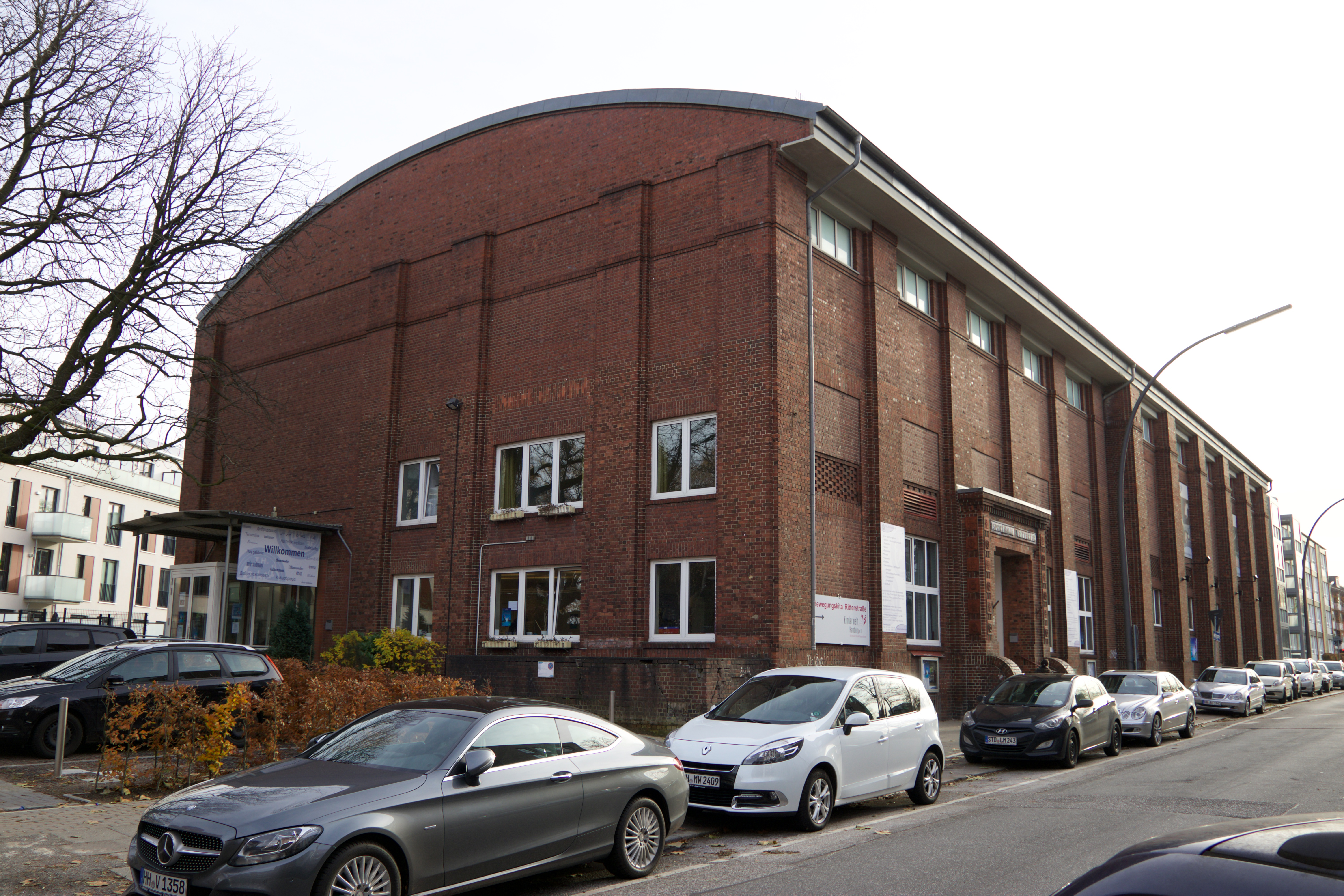 Ernst-Moritz-Arndt-Halle, Ritterstraße 9, 22089 Hamburg, Haupthalle und Sitz des Turnerbund Hamburg-Eilbeck e.V. (T.H.-Eilbeck) gegr. 1880